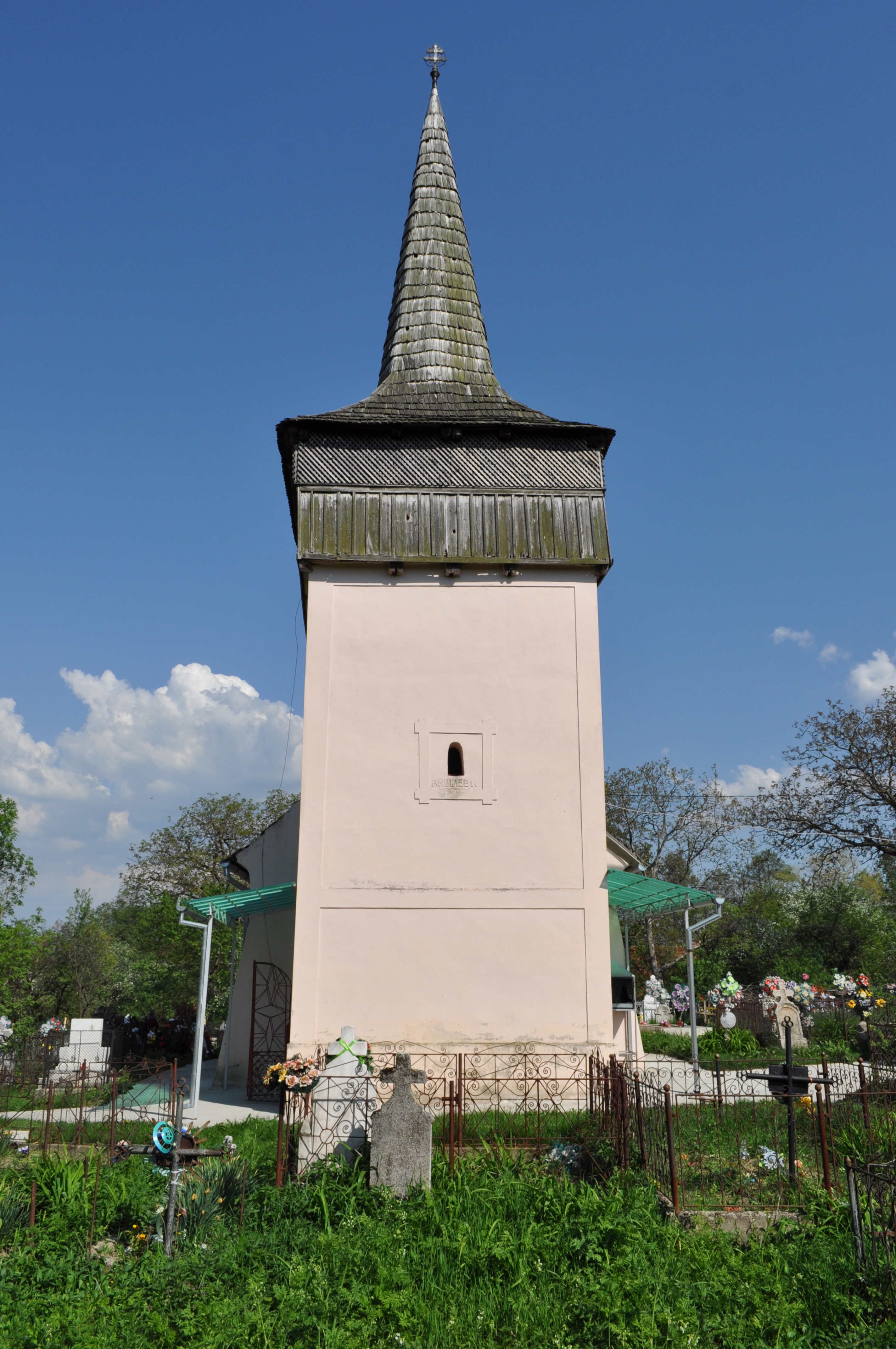 Biserica "Pogorârea Sf. Duh", sat PAROŞ; comuna SĂLAŞU DE SUS